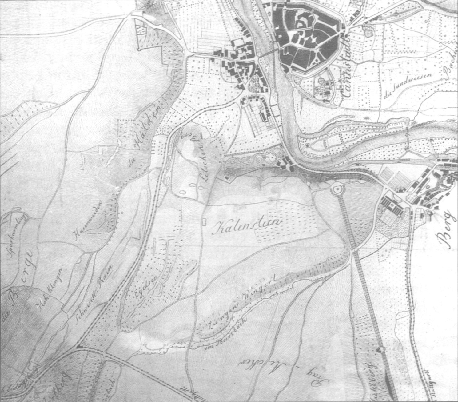 „Plan der Gegend um Cannstadt“ (Ausschnitt) von Karl August Friedrich von Duttenhofer, 1816.